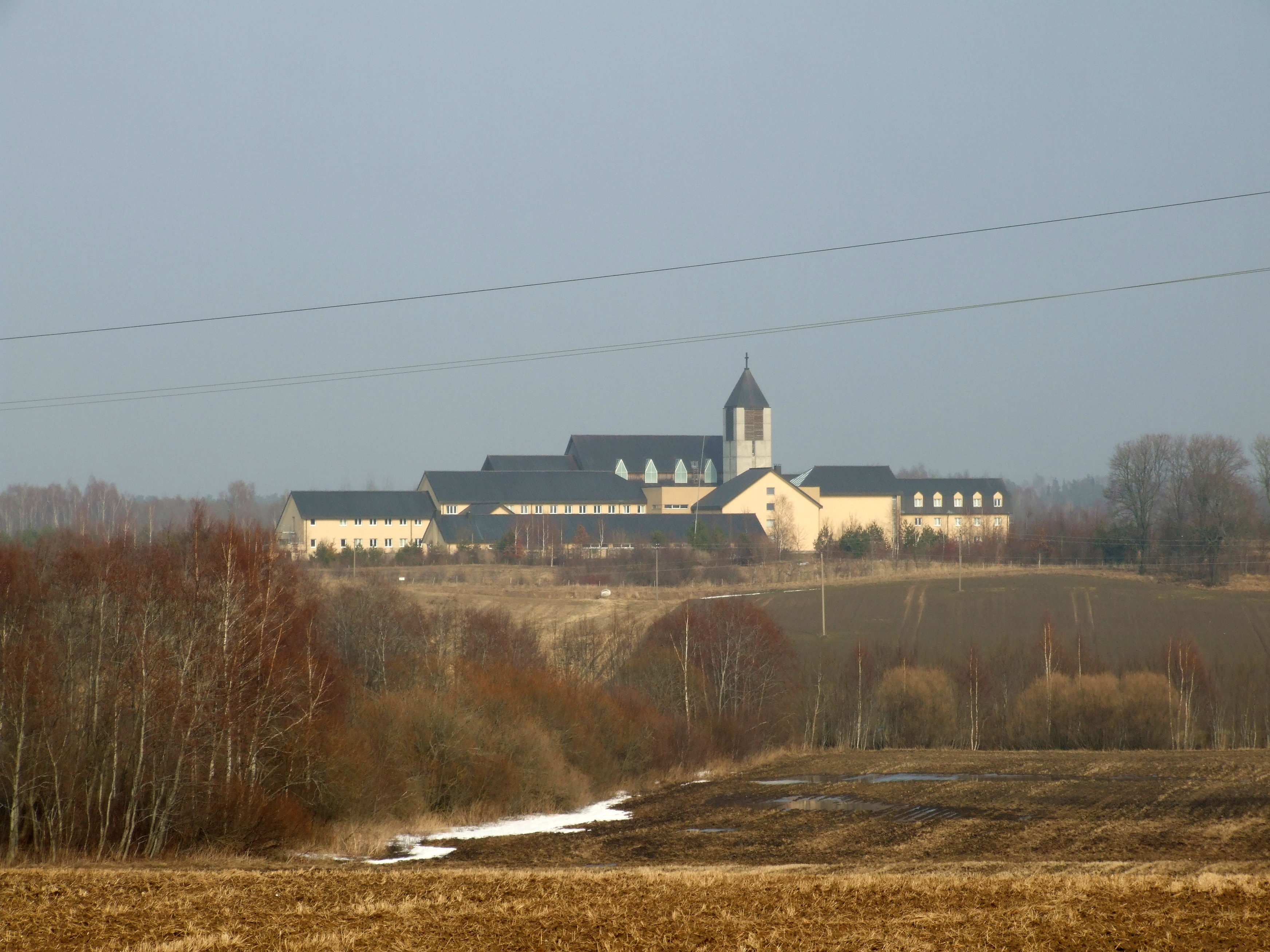 Šv.Benedikto vienuolynas